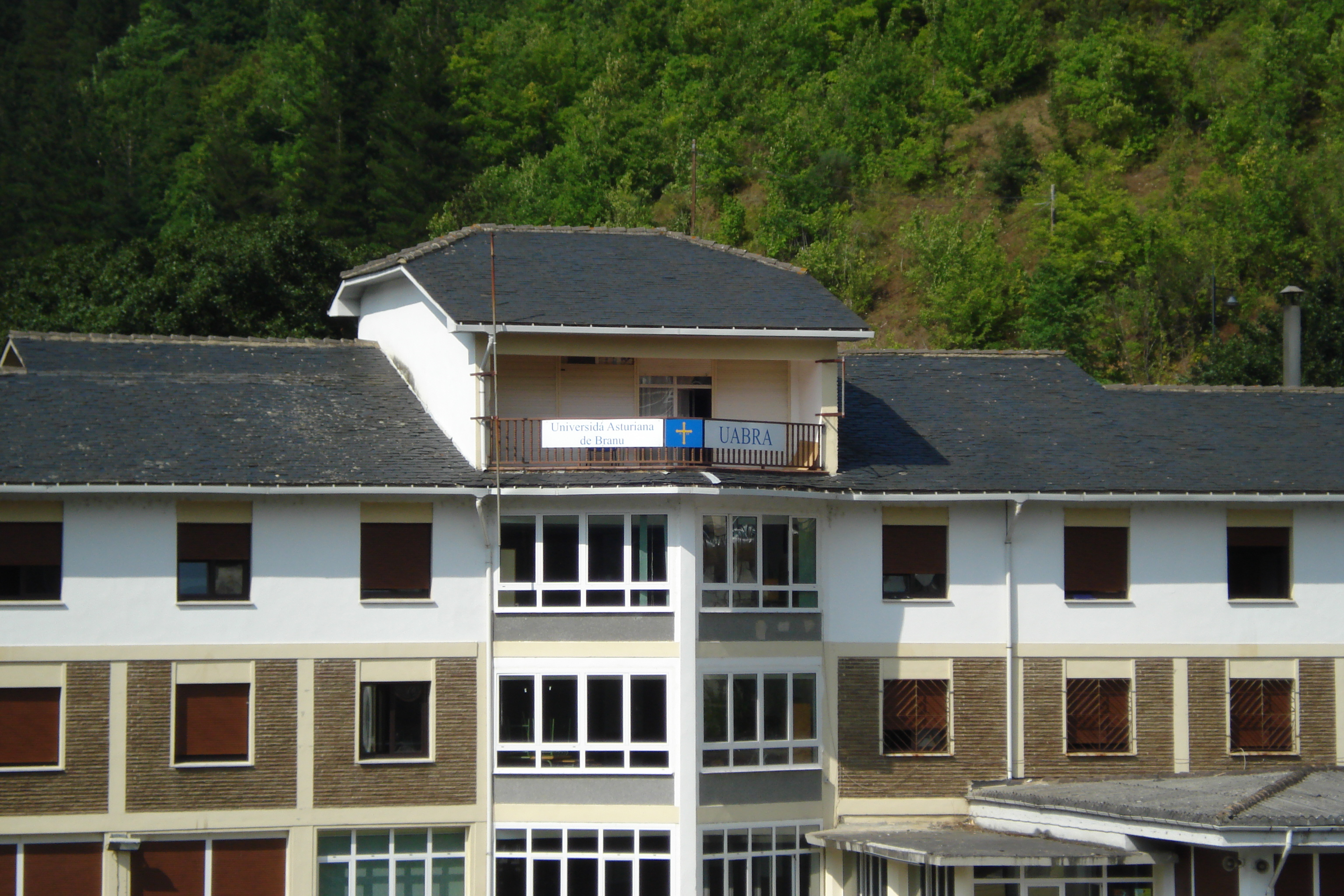 Escuela-hogar d'El Regueirón, de Cangas, au s'agospien alumnos y profesores de la UABRA